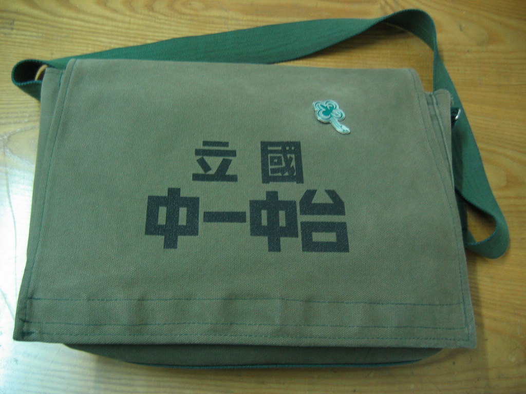 台中一中書包。